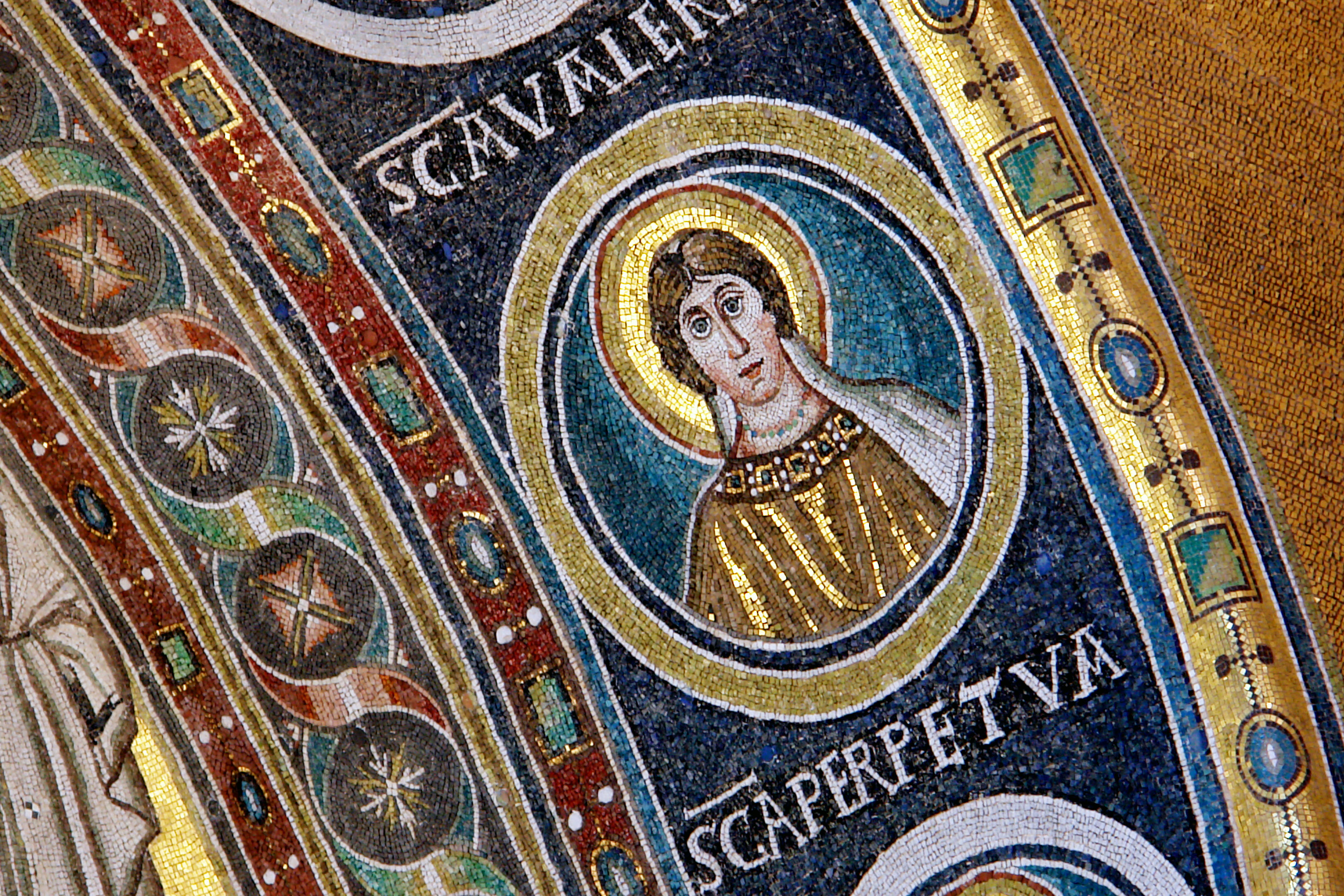 Szent Euphrasius-bazilika, mozaikok (Z-2432 Poreč Kompleks Eufrazijeve bazilike)